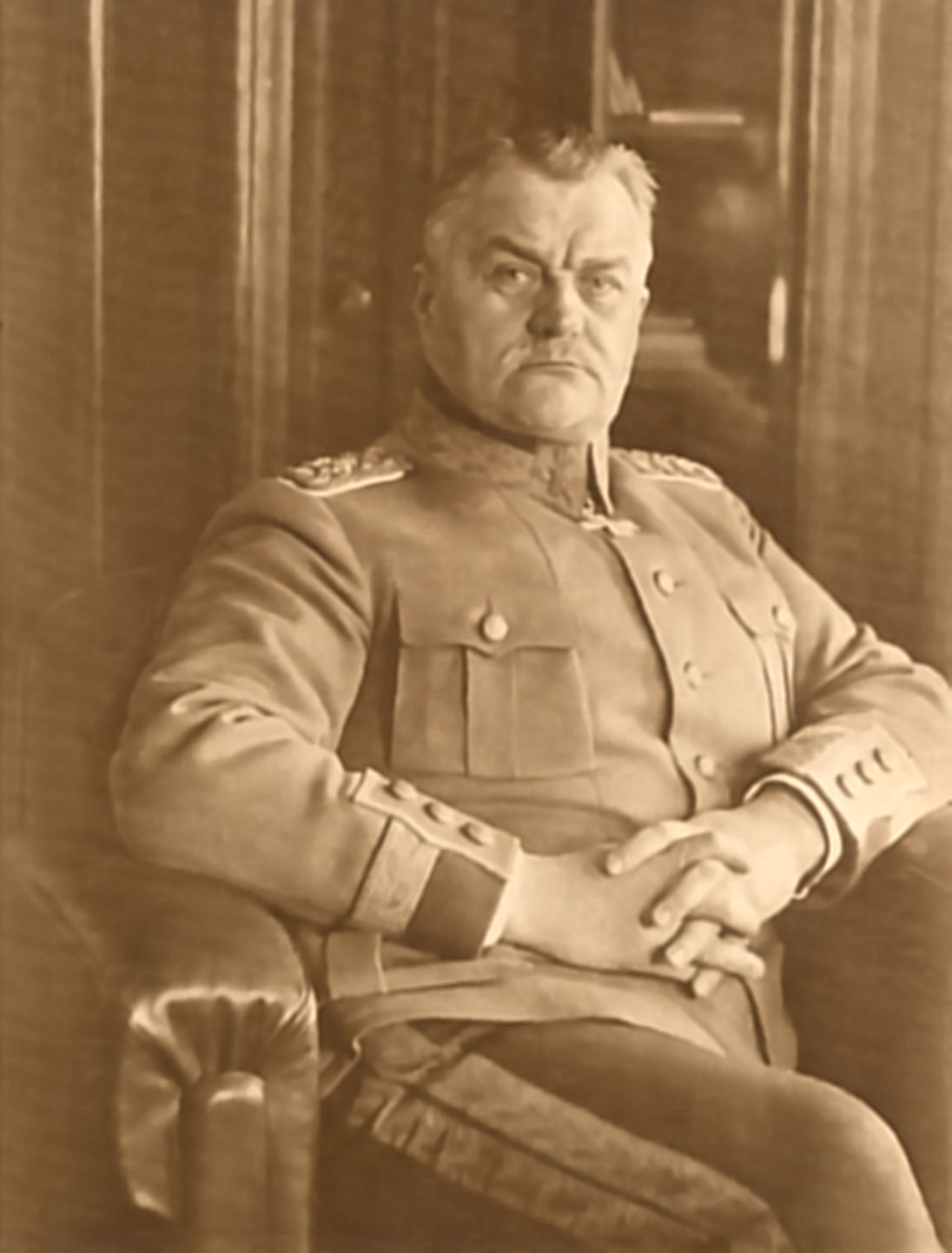 Description